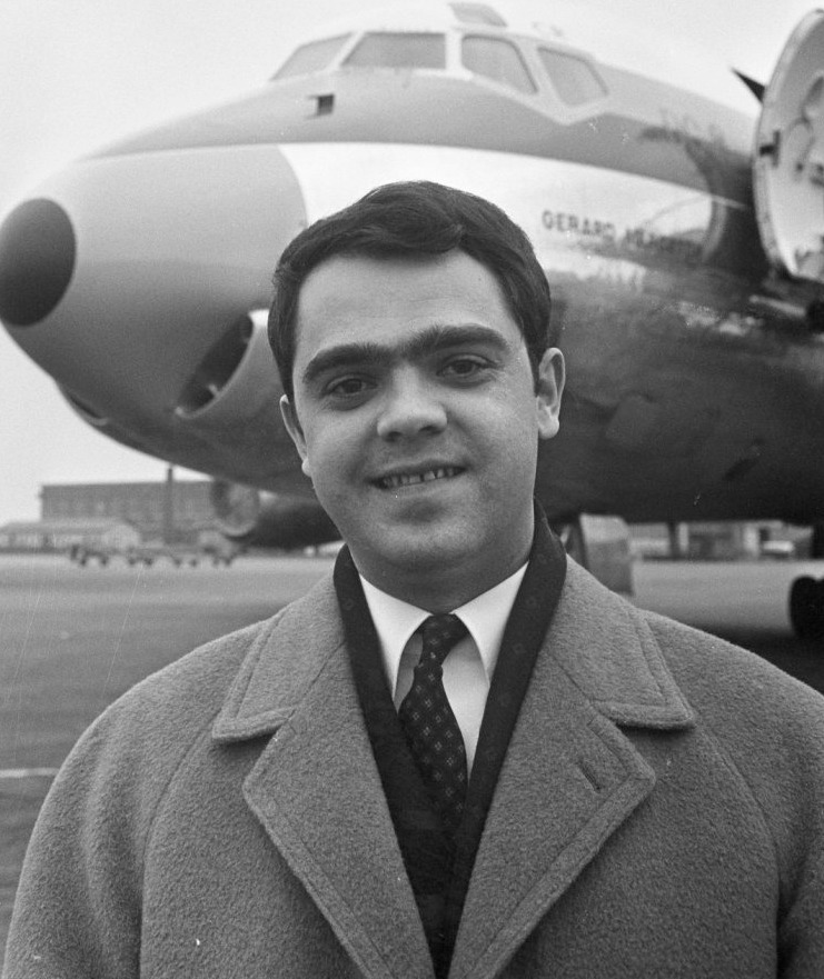 Aankomst Duitse jazz-pianist Eugen Cicero op Schiphol